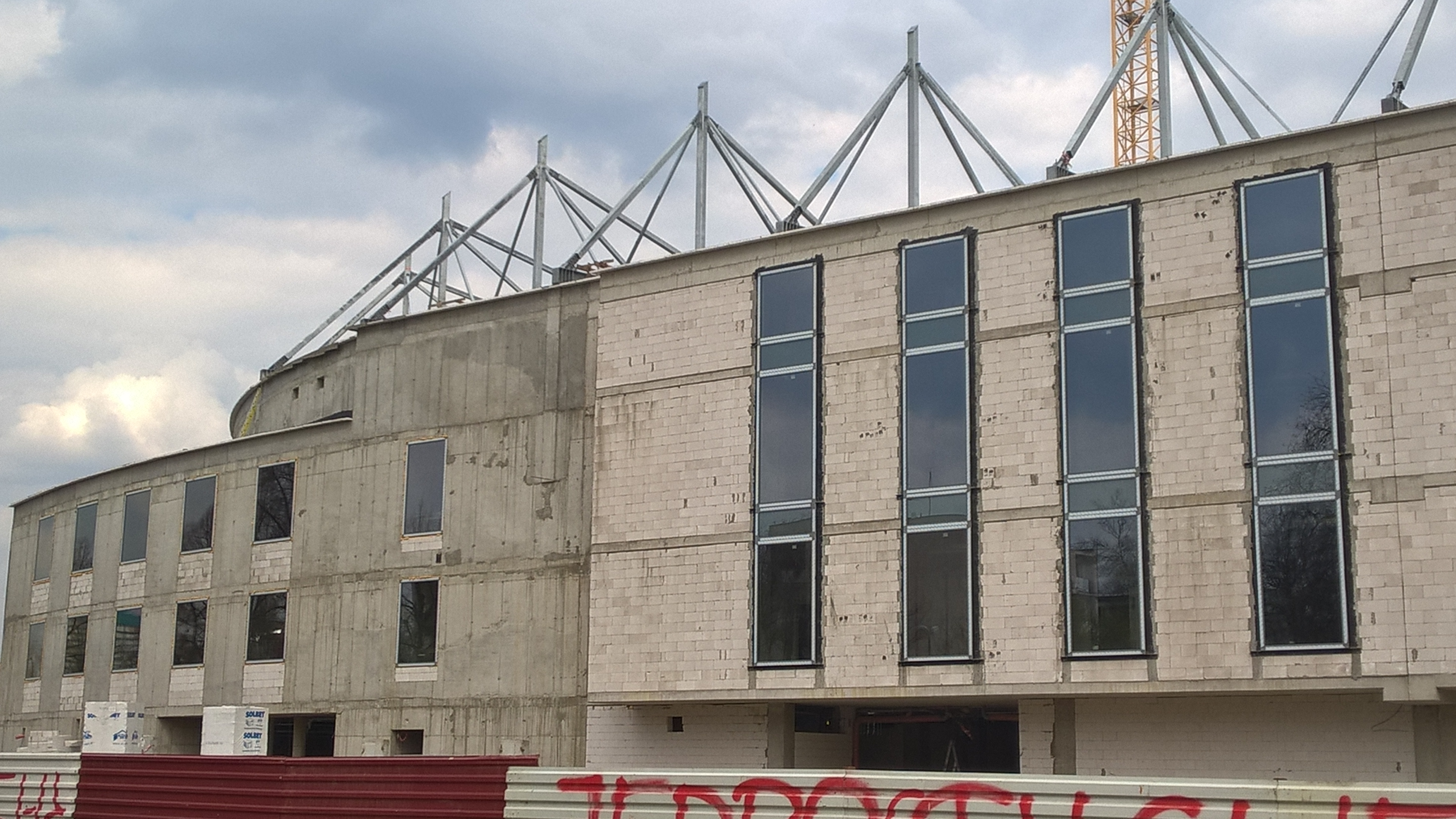 Budowa stadionu Widzewa Łódź - kwiecień 2016